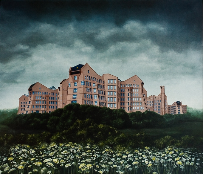 Ans Markus Hoofdkantoor NMB Bank 1987 olieverf op doek Gebouw in fantasielandschap met fluitekruid Ans Markus NMB Bank Headquarters 1987 oil on canvas Building in fantasy landscape with cow parsley